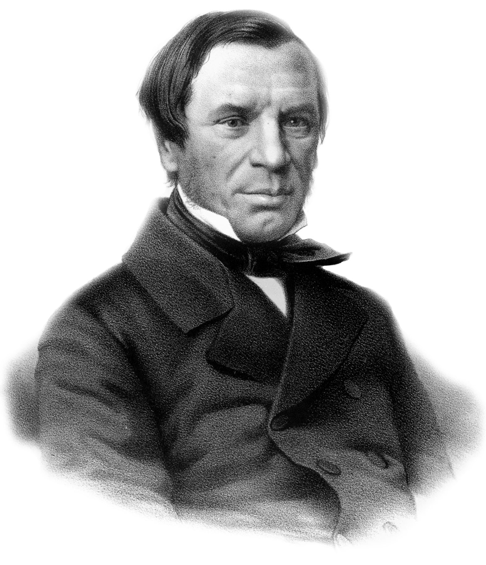 M. POGODINE. Съ Фотограф. Бергнера. Лит. А. Мюнстера, СПБ. Imp. Lith. A. Munster (Editeur)